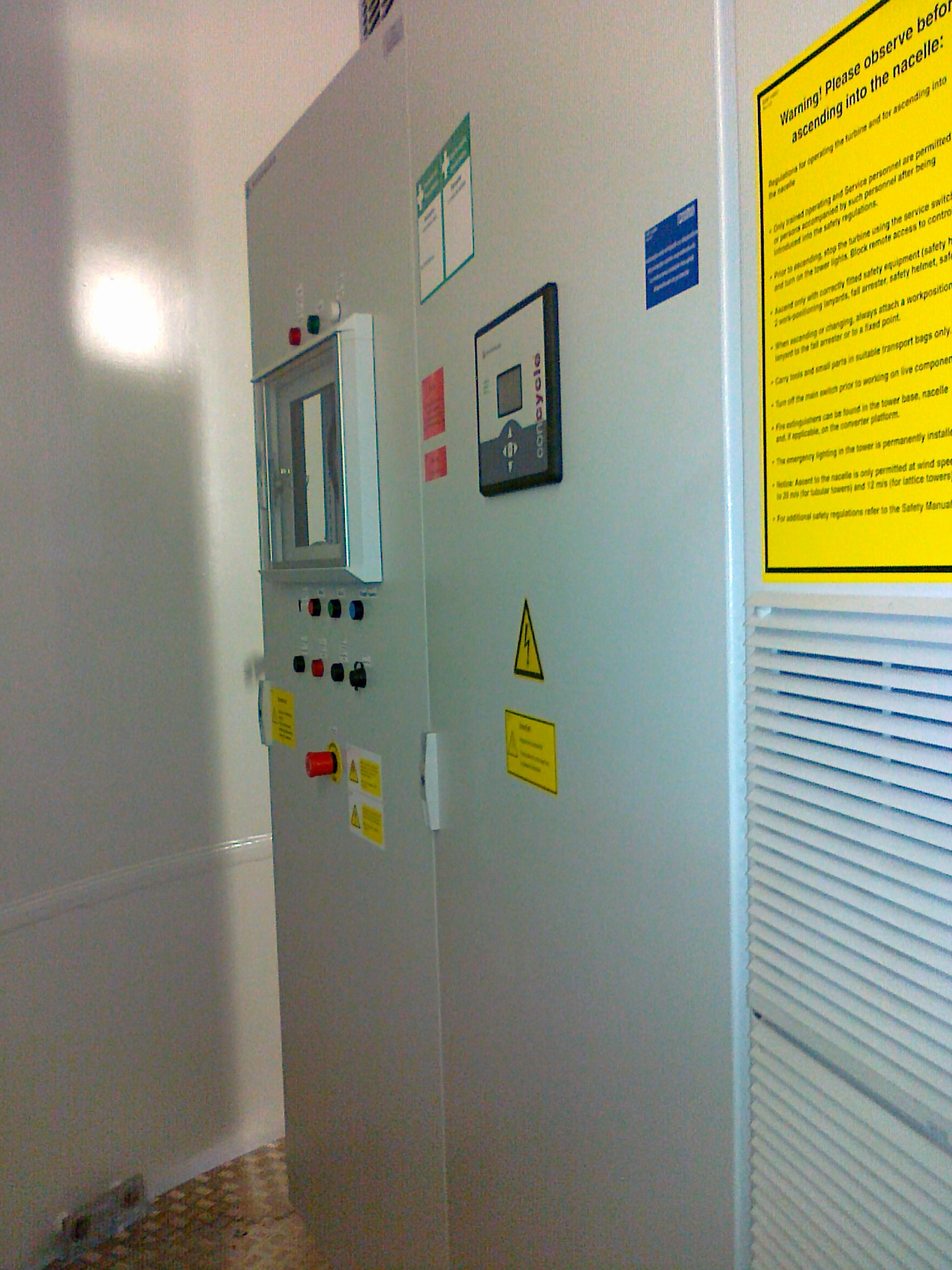 தானியங்கி திளில் நுட்பம்